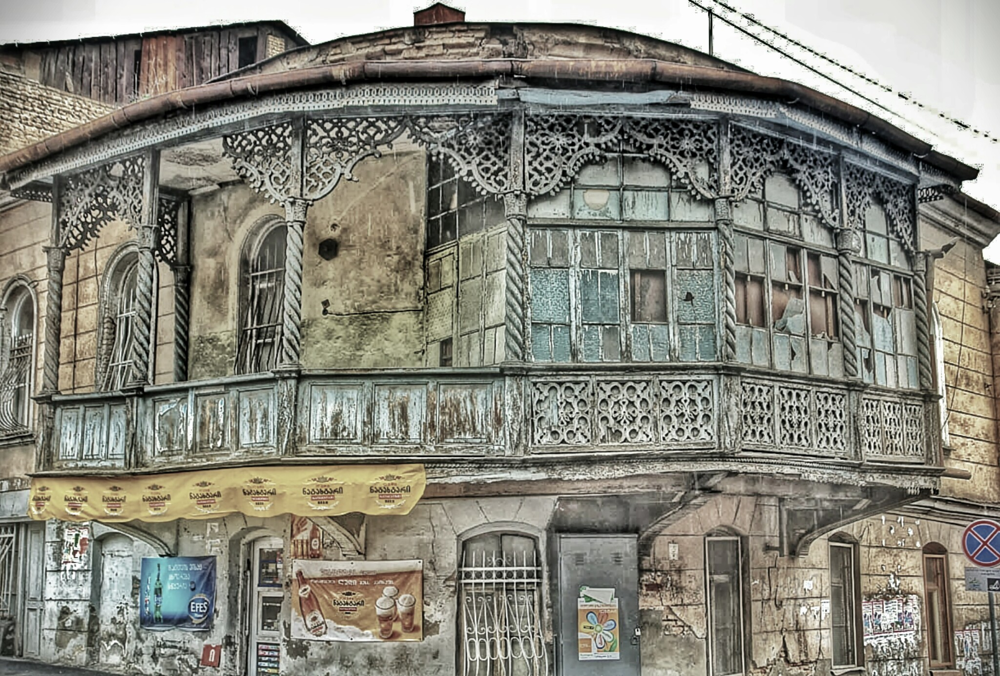 Asatiani corner Datiani street